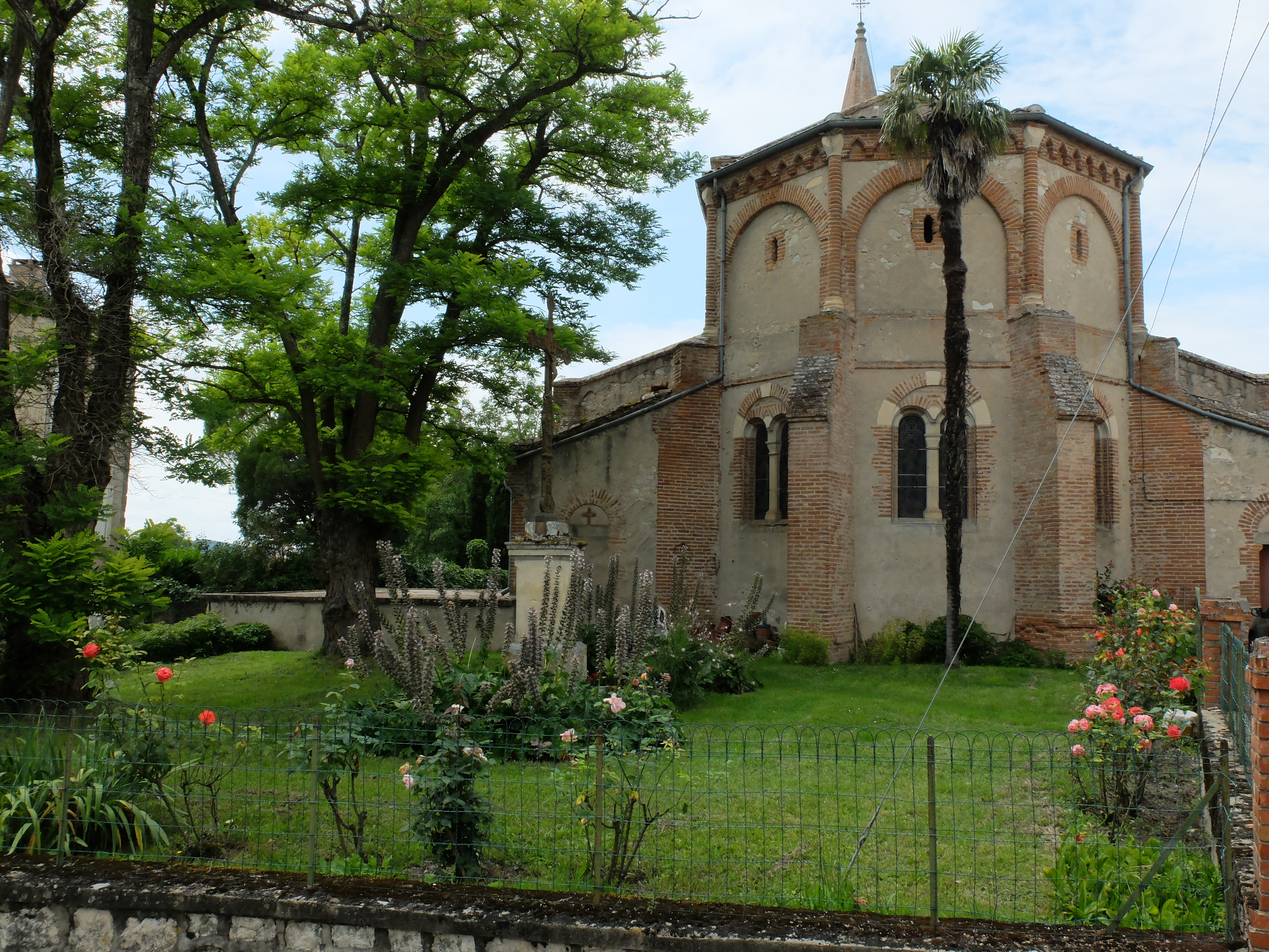 L'abside de l'église de Teyssode